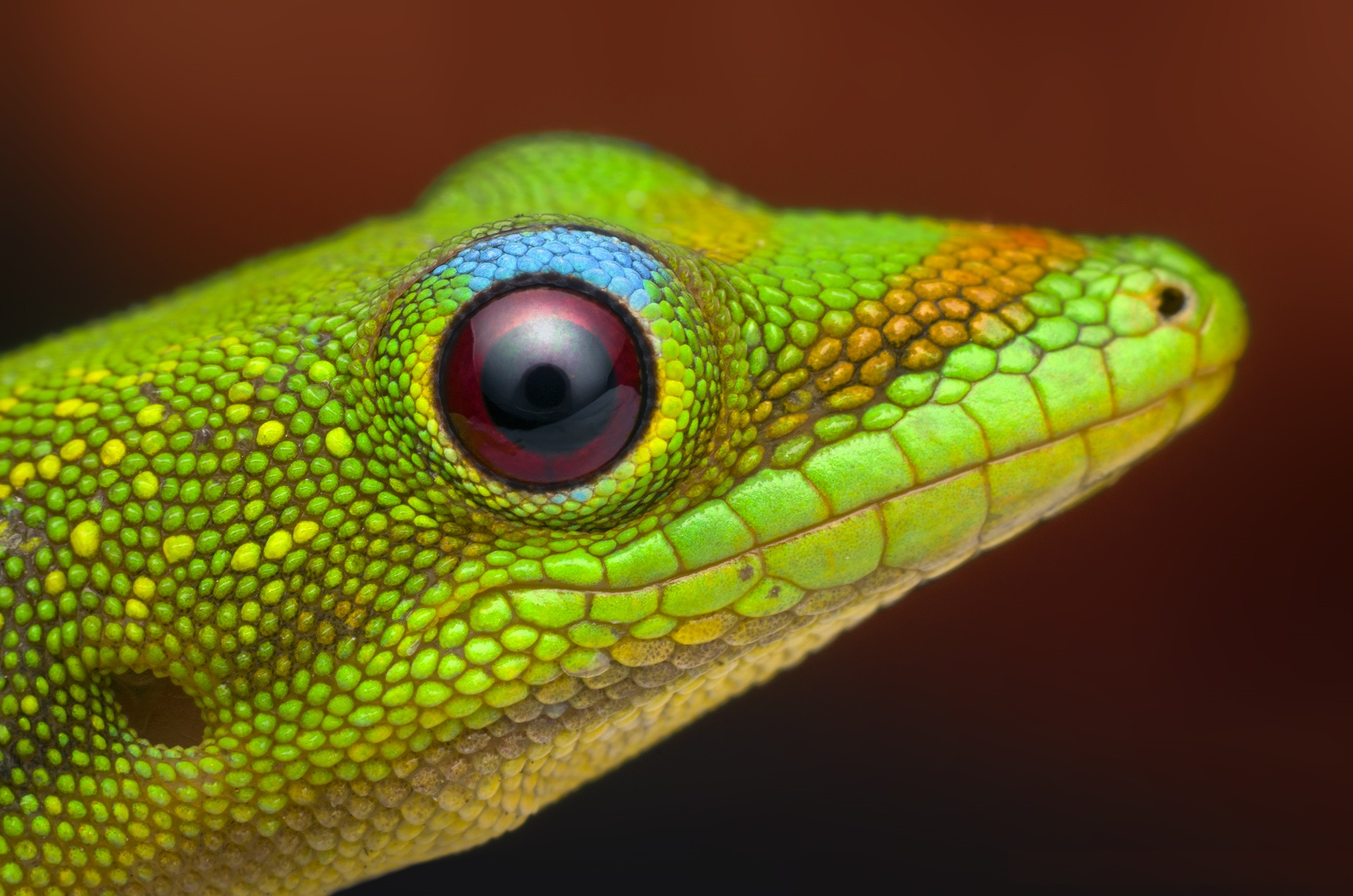 Phelsuma laticauda, Oahu, Hawái